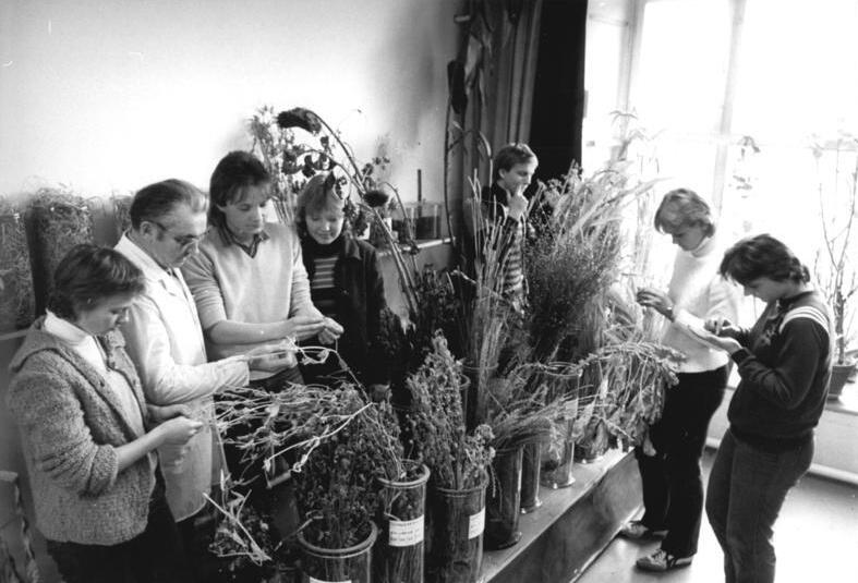 Pesterwitz, Auszubildenen, Bestimmung von Pflanzen ADN-ZB Häßler 22.12.83 Bez. Dresden: Lehrlingsausbildung. In der Betriebsberufsschule des VEG Pesterwitz bei Dresden werden Zootechniker für die Rinder- und Geflügelproduktion, Agrotechniker und Forstfacharbeiter ausgebildet. In einer zwei- bzw. dreijährigen (mit Abitur) Lehrzeit eignen sich z.Z. 560 Jugendliche fundiertes Wissen und Können an. Lehrer Heinz Hegewald (2.v.l.) bestimmt mit den Lehrlingen verschiedene Futtermittel. siehe auch 1983-1222-15N